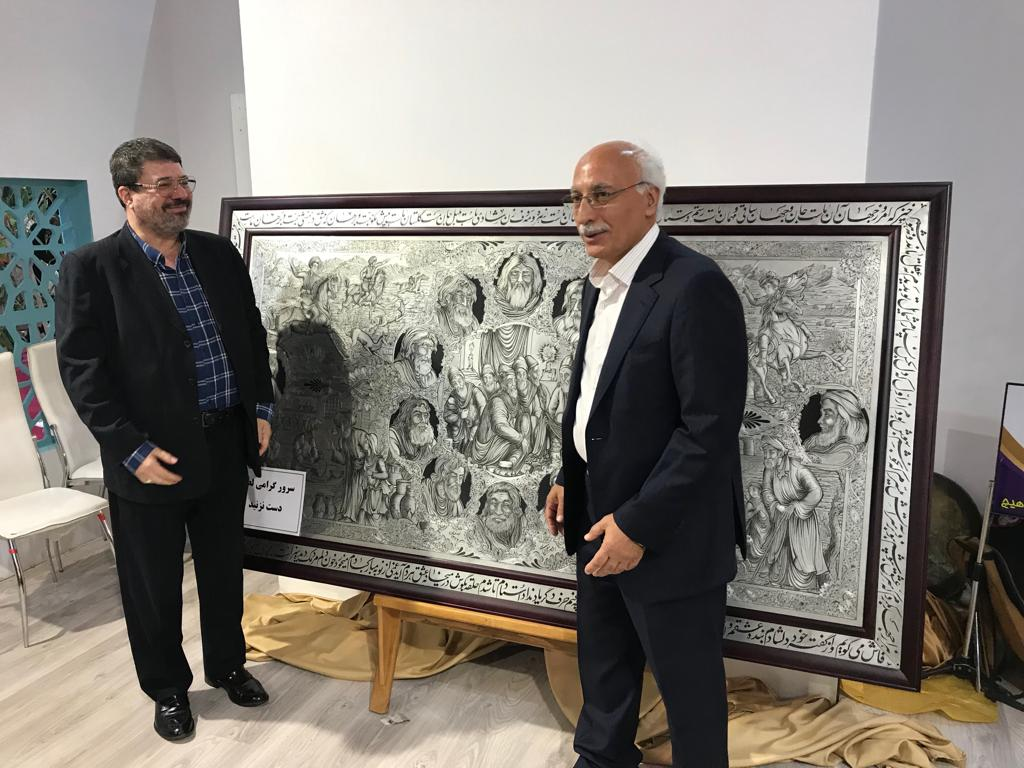 تابلوی مشاهیر در نمایشگاه بین الملی تهران و حضور جناب غمخوار